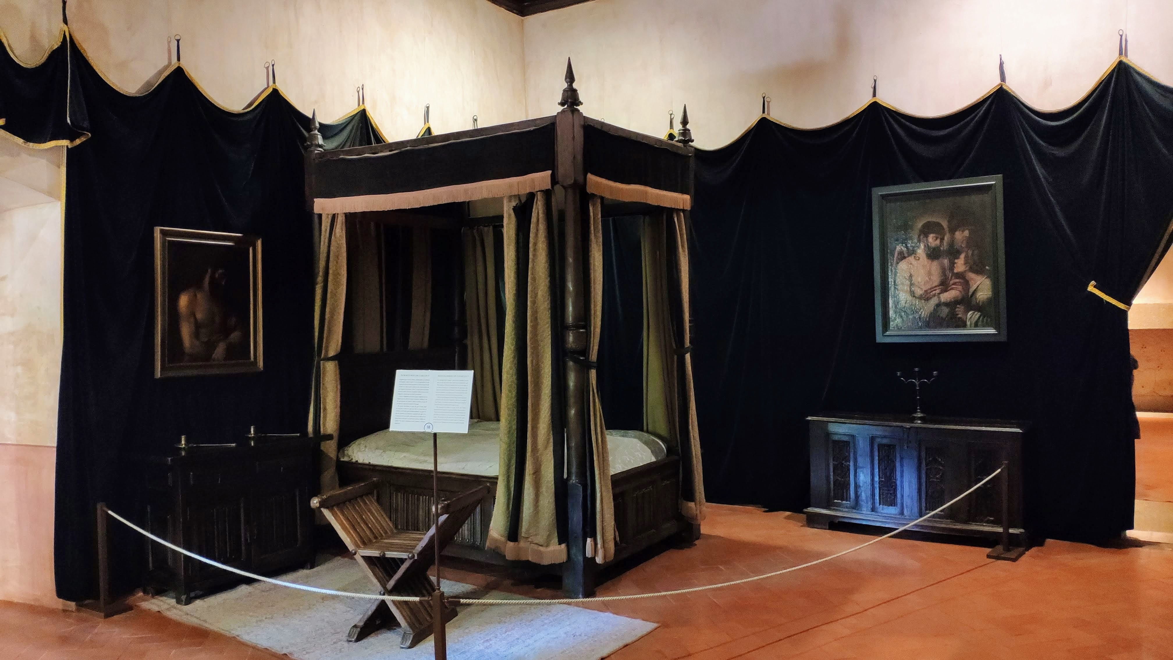 Dormitorio del emperador Carlos V en el palacio de Yuste, Cáceres